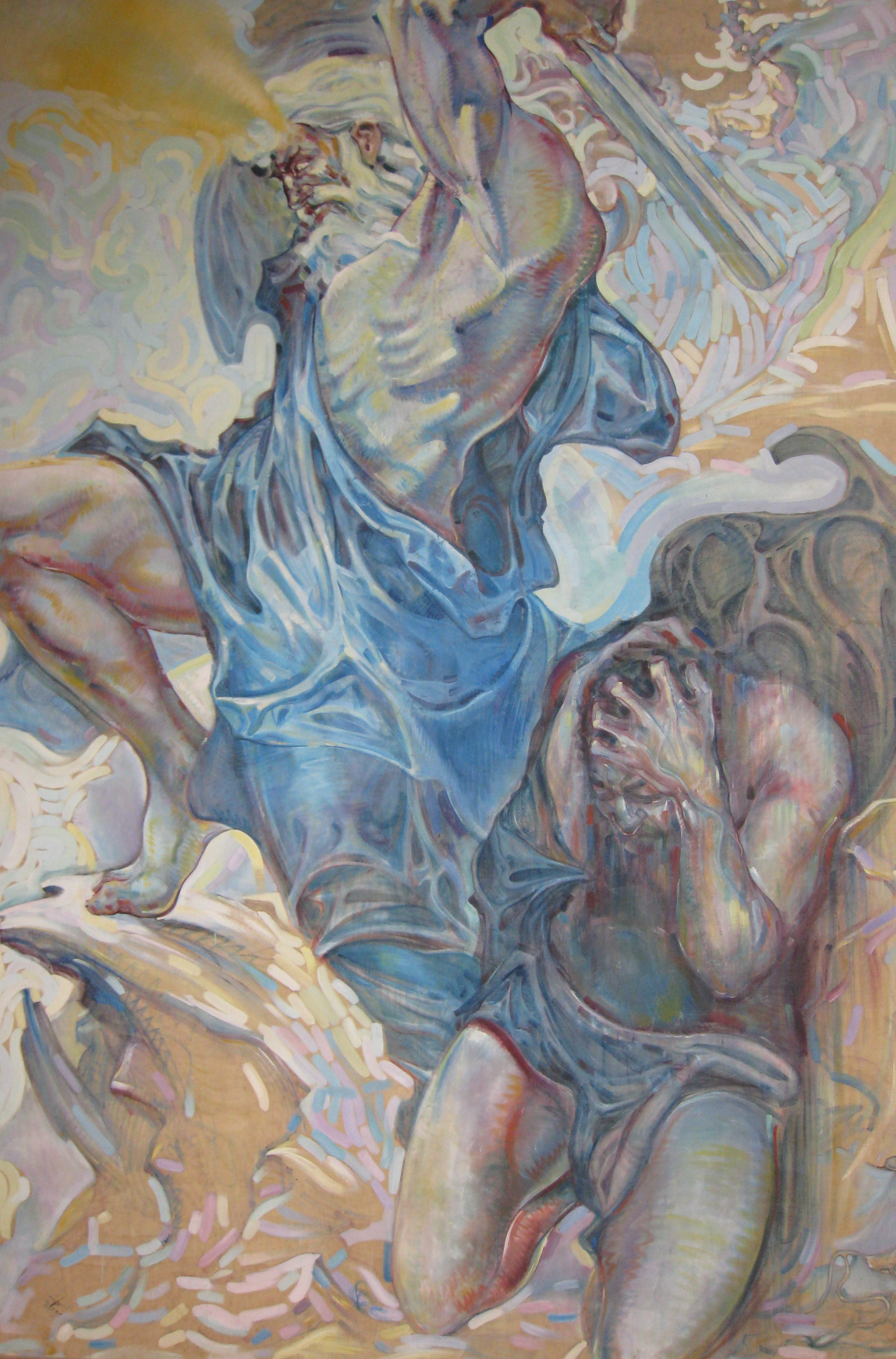 Mount Scopus הר הצופים